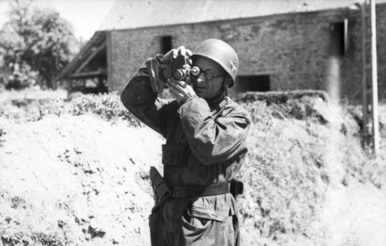 Frankreich, Soldat beim Fotografieren Frankreich.- Invasion, PK-Bildberichter der Fallschirmjäger (Fotograf der Propagandakompanien der Wehrmacht) mit Leica Fotoapparat fotografierend; PK Fs AOK